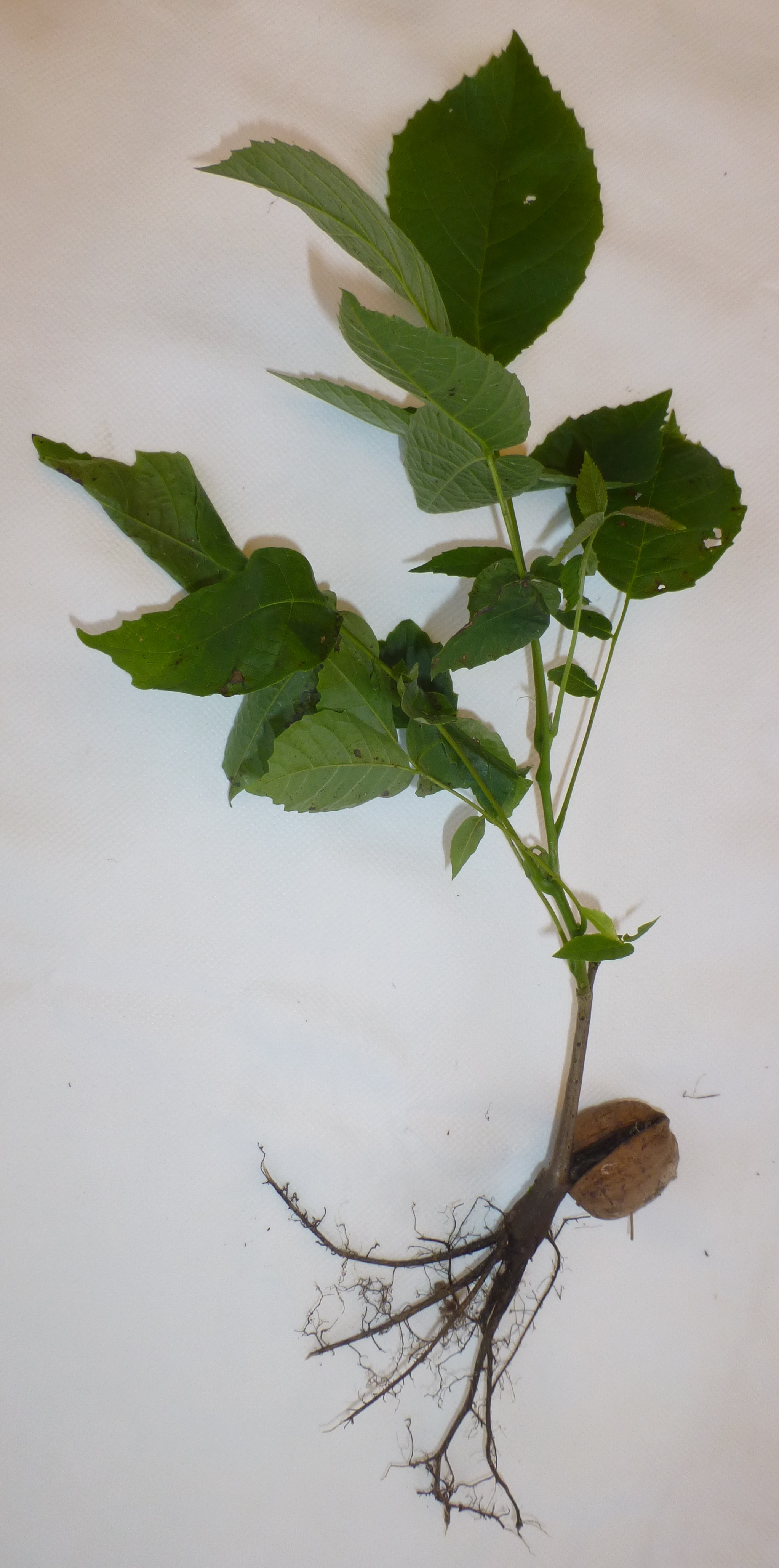 Noyer poussant de la noix.